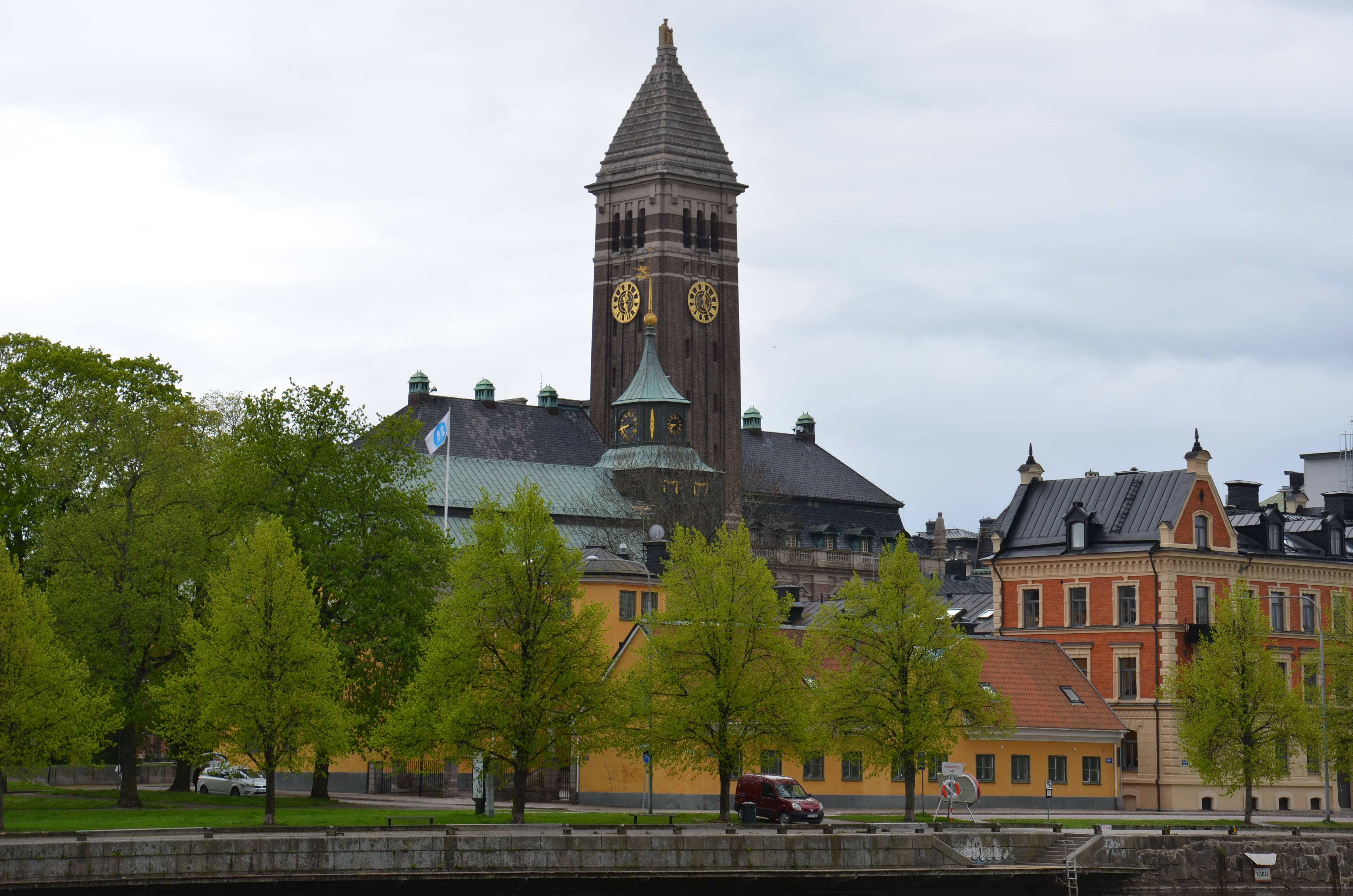 Gamla Stadshuset i Norrköping in Norrköping